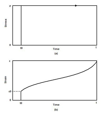 蠕变图片